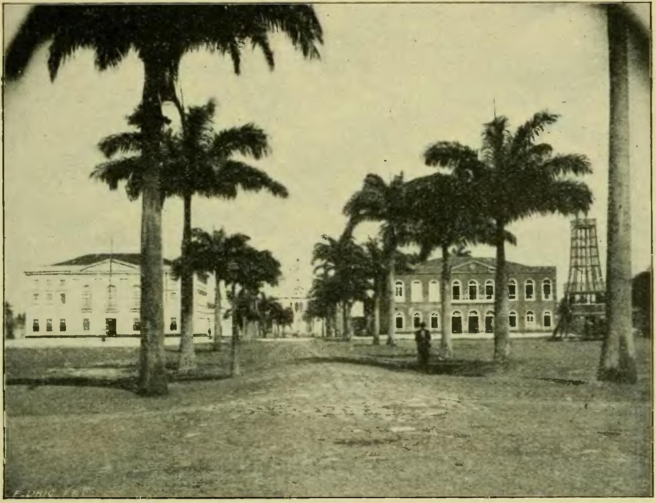 Praça de Palácio, Aracajú, Sergipe, Brasil (c. 1903)